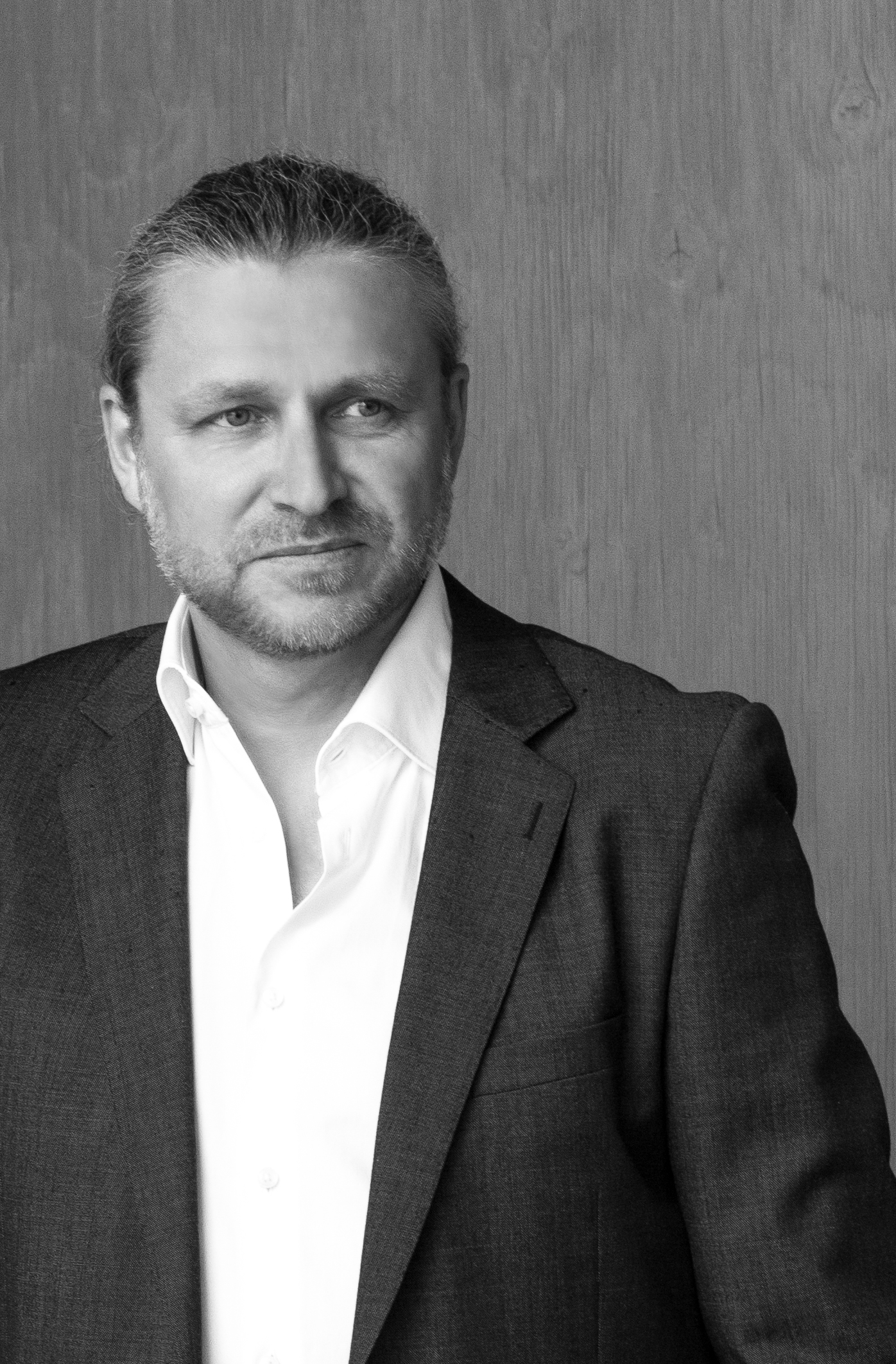 Komponist, Verleger und Bandleader Alexander Pfluger